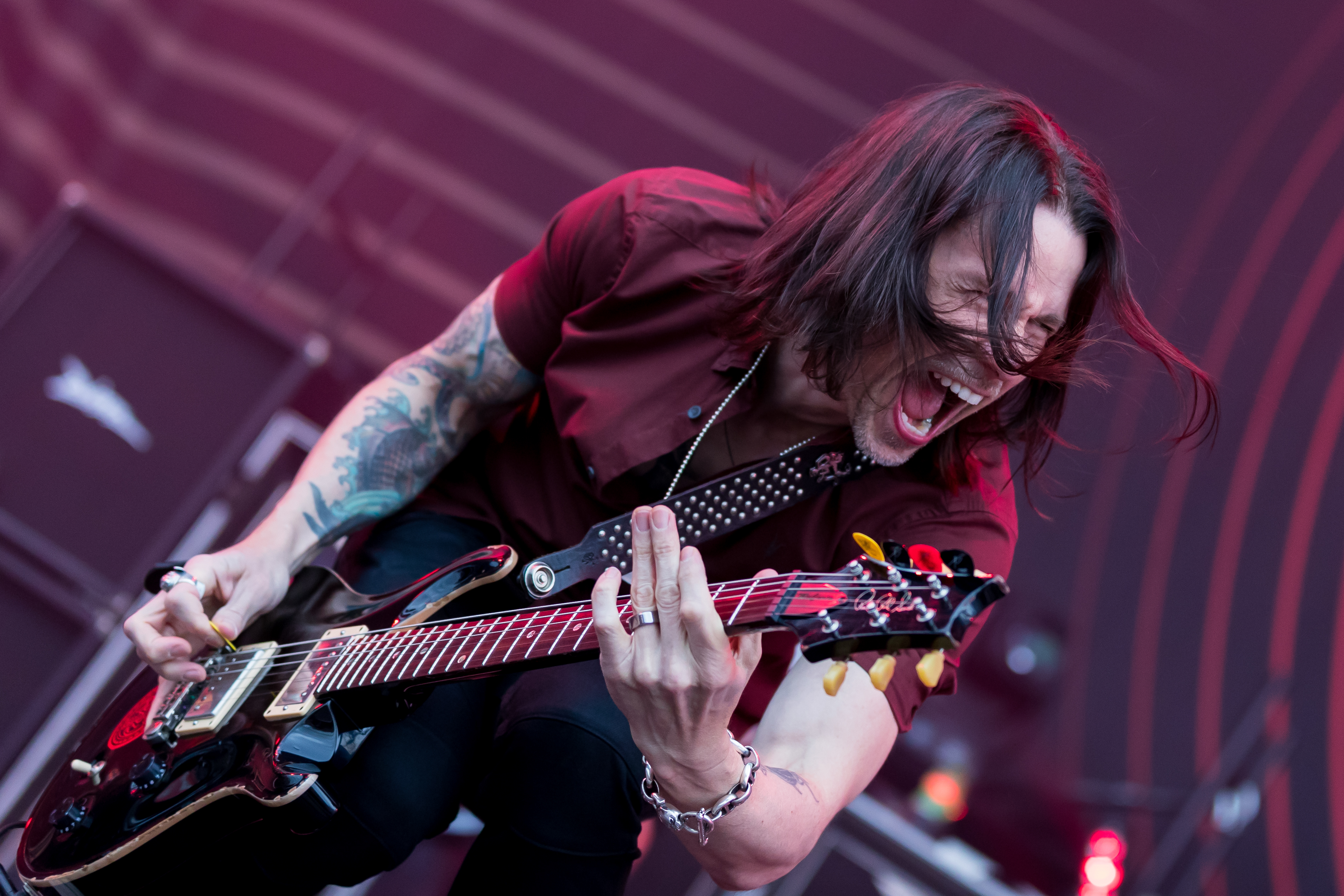 Alter Bridge during Rock am Ring at Nürburgring, Nürburg, Rheinland Pfalz, Germany on 2017-06-04, Photo: Sven Mandel